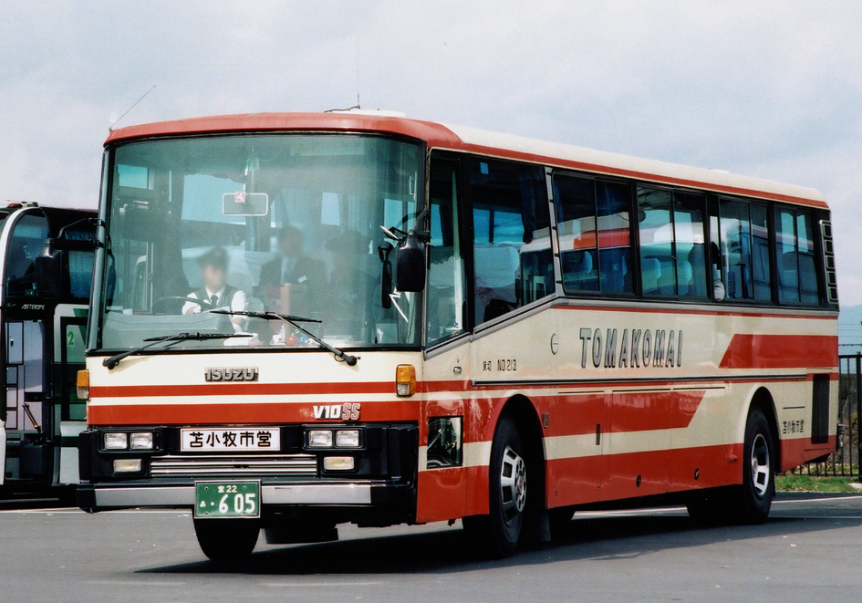 苫小牧市営バス いすゞ K-CSA650 富士重 15型R3